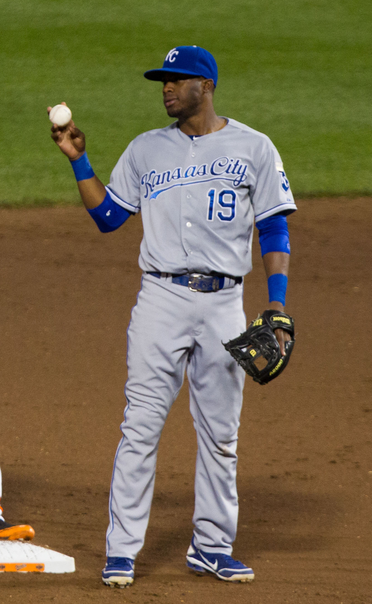 Irving Falu